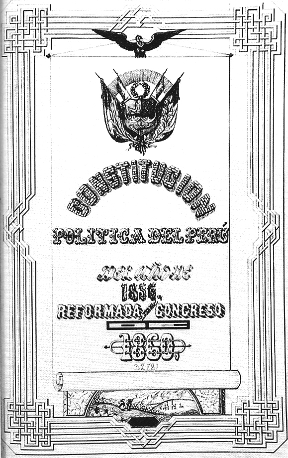 Portada de la Constitución Política del Perú de 1860